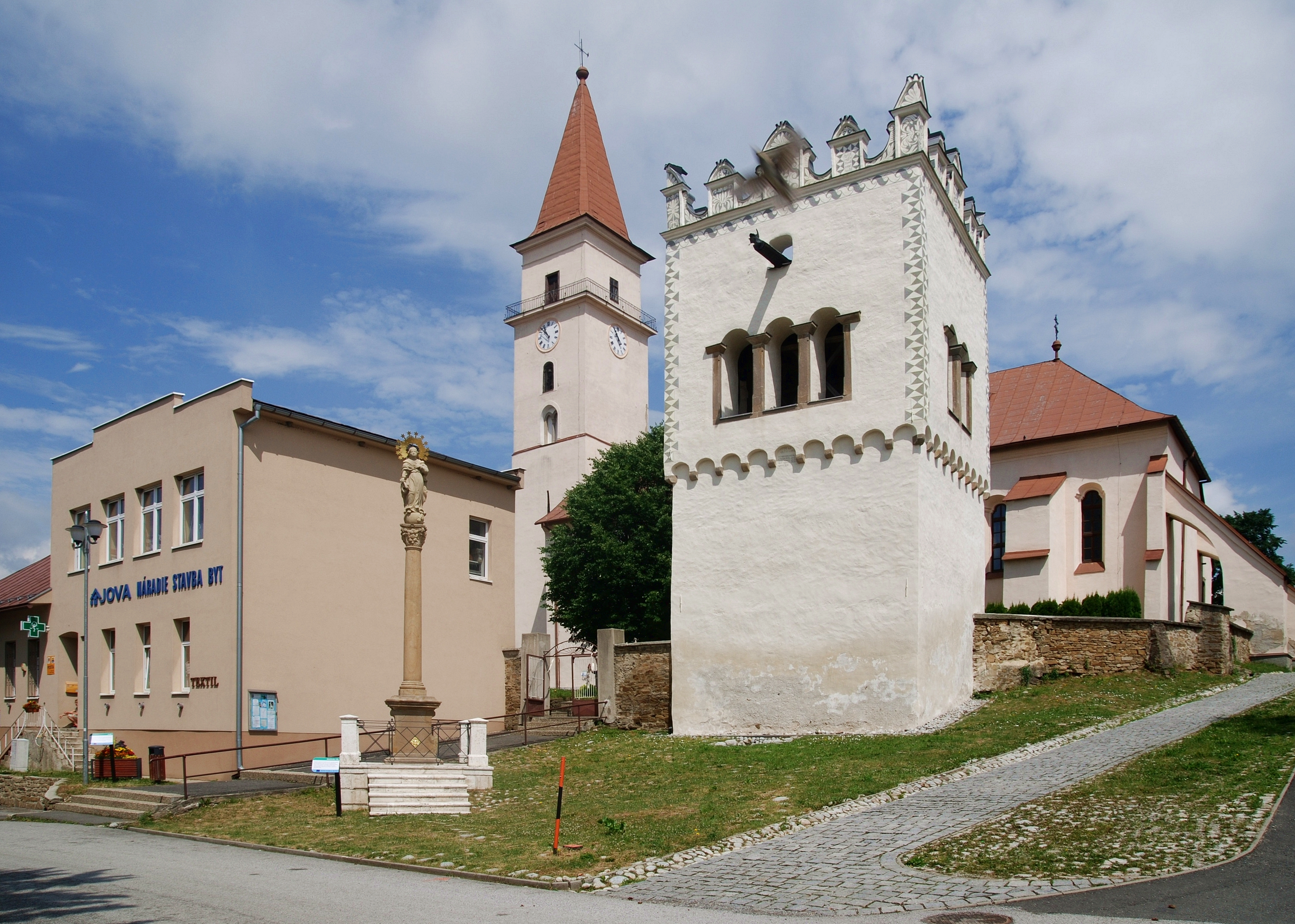 wieś Vrbov